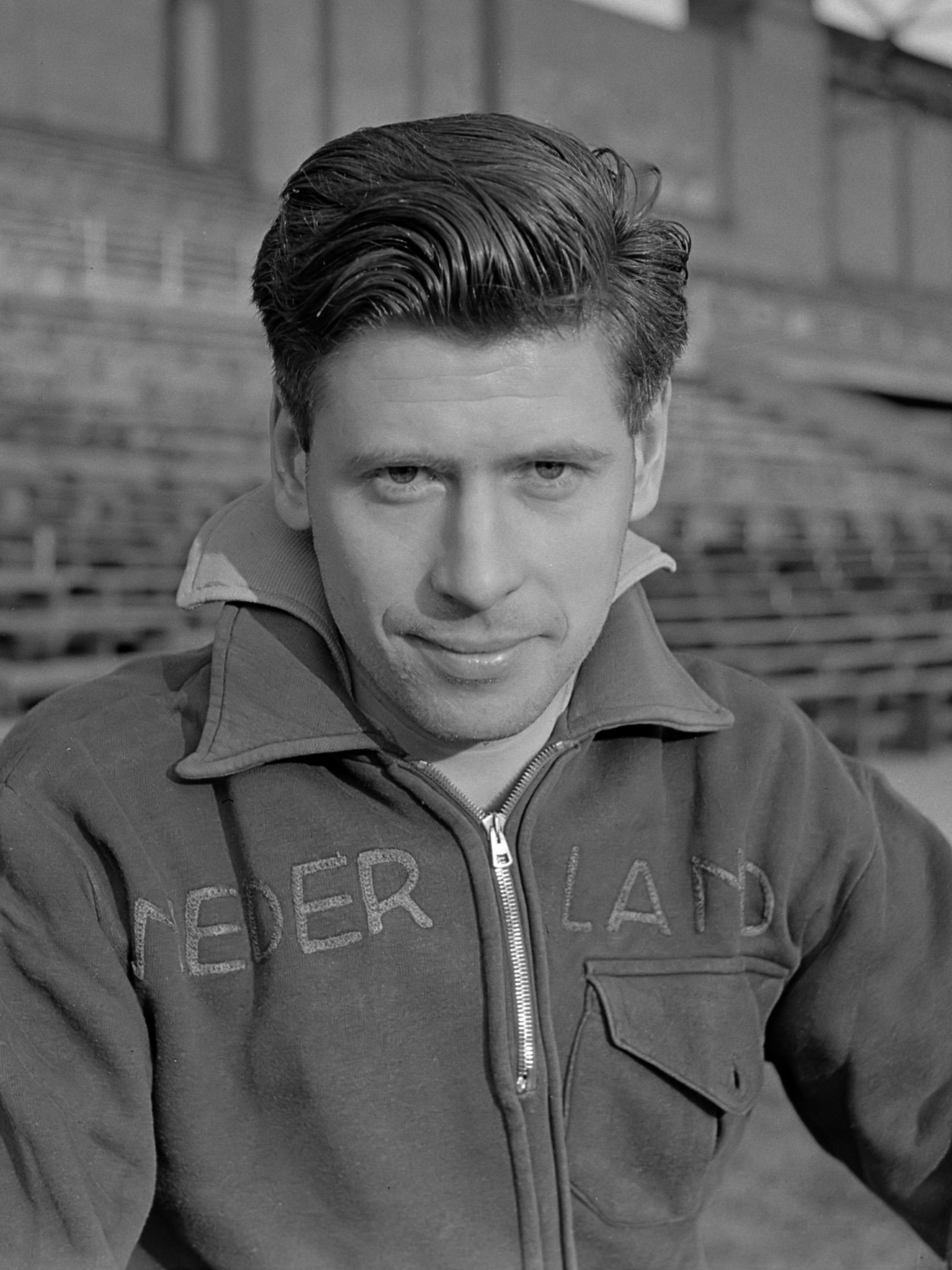 Nederlands voetbalelftal 1951. Jampie Kuneman (HBS) in het Olympisch Stadion in Amsterdam, enige dagen na de oefeninterland tegen België 24 april 1951